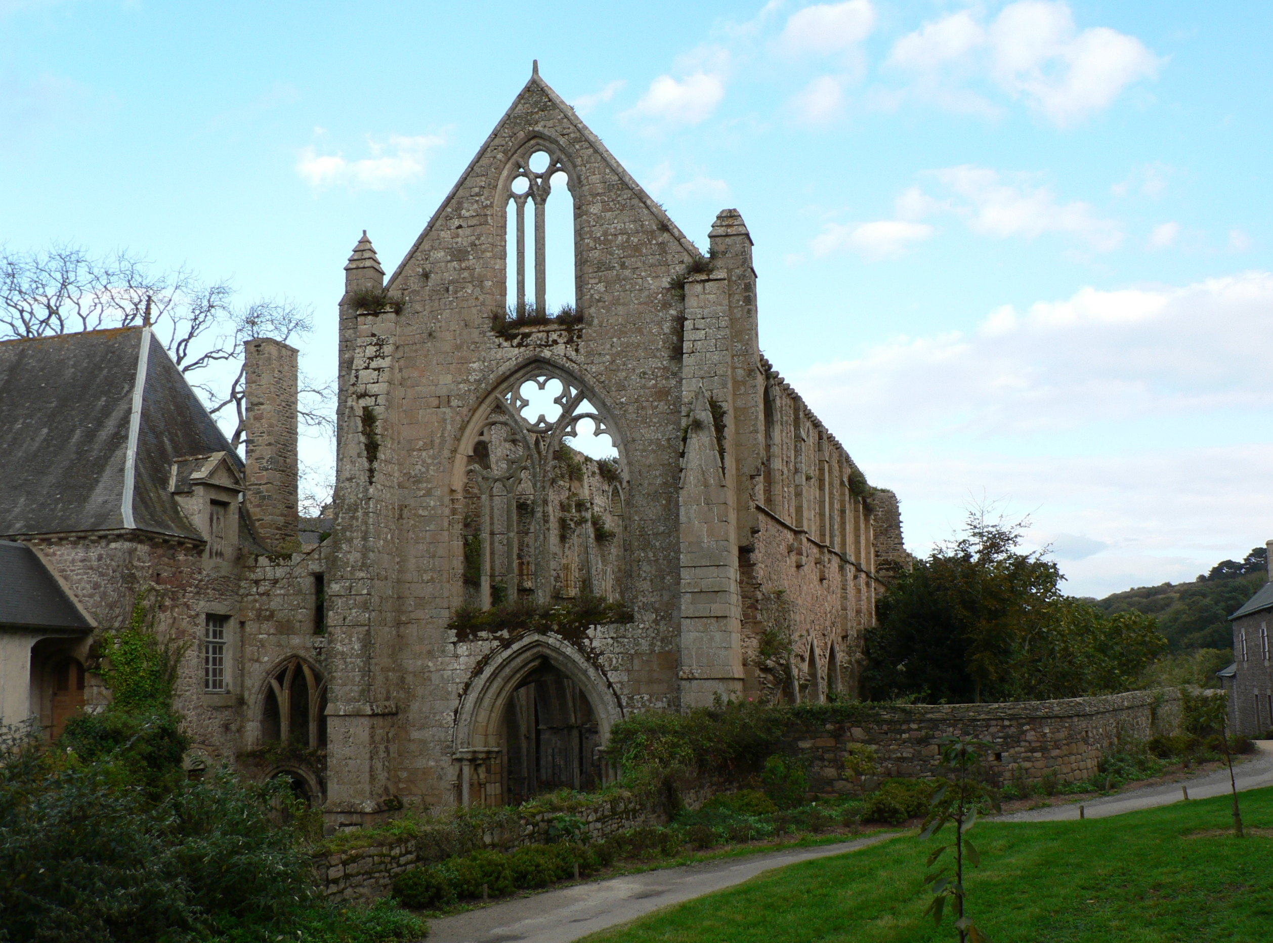 Abbaye de Beauport, Paimpol, Bretagne (France)